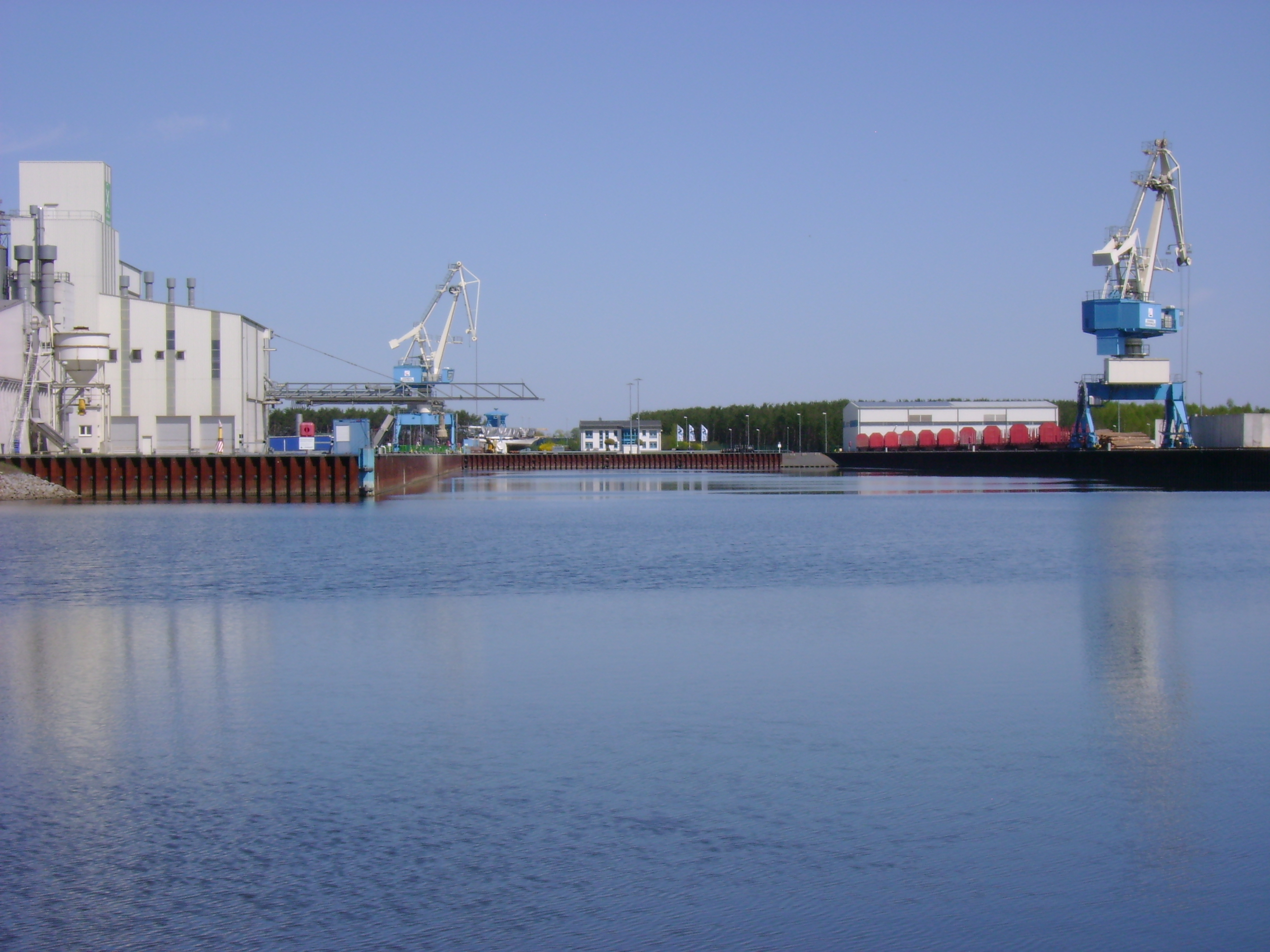 Hafen Schwedt, als Stichhafen ausgeführt, an der Hohensaaten-Friedrichsthaler Wasserstraße